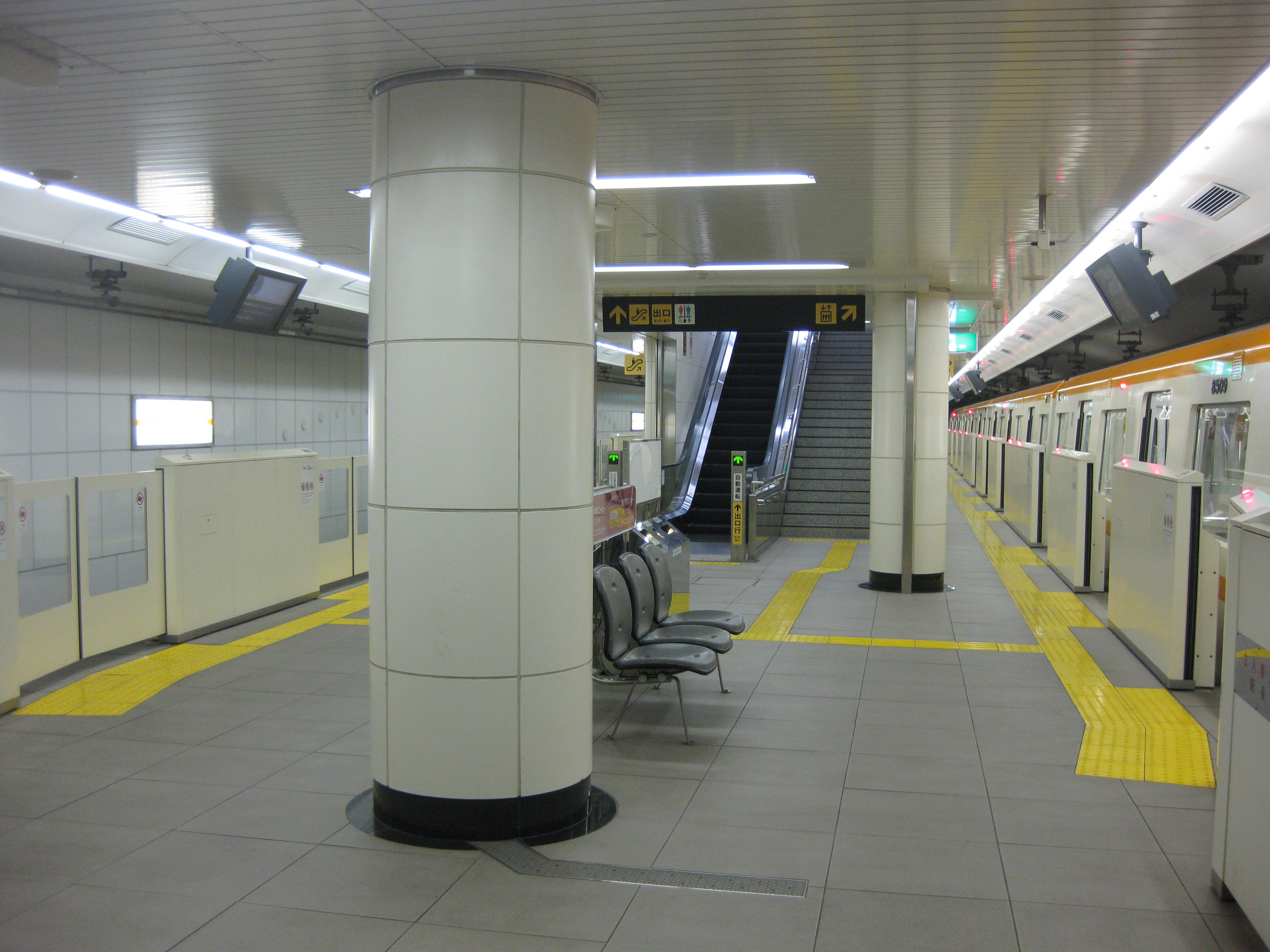 地下鉄今里筋線井高野駅プラットホーム